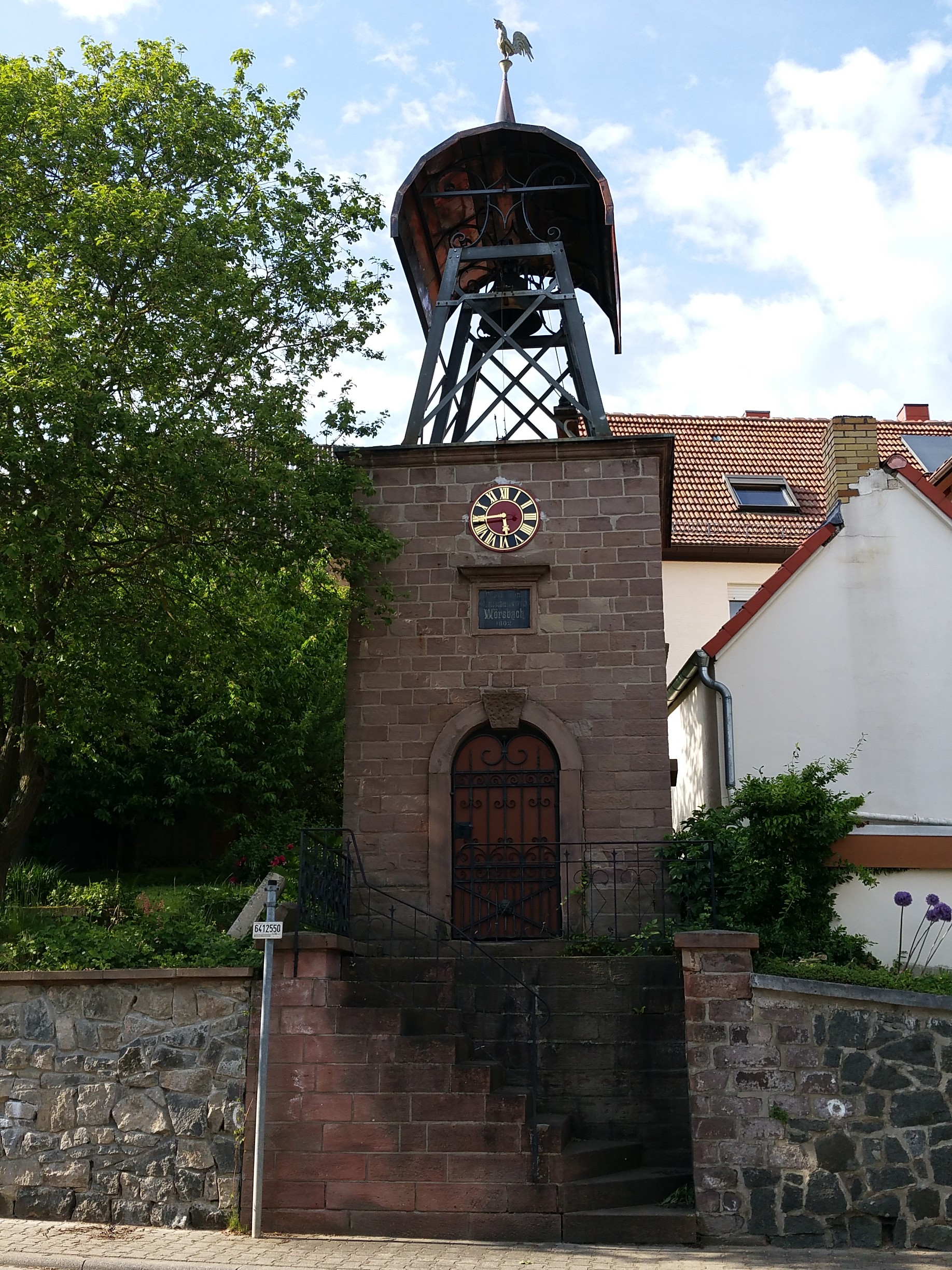 Protestantischer Glockenturm Wörsbach